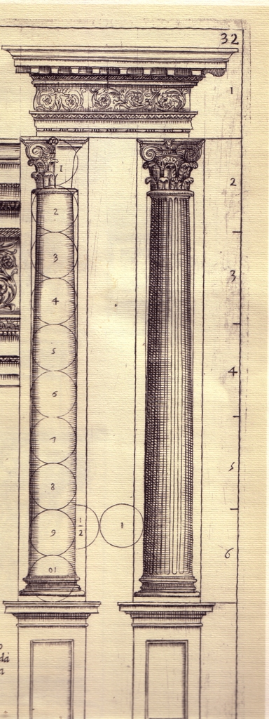 Composite order